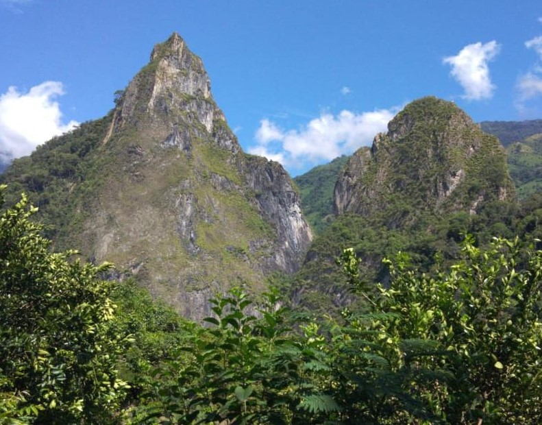 Cerros de Tena y Fura vistos desde una vereda (Furatena) del municipio de San Pablo de Borbur, Boyacá.